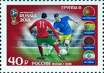 Группа В.